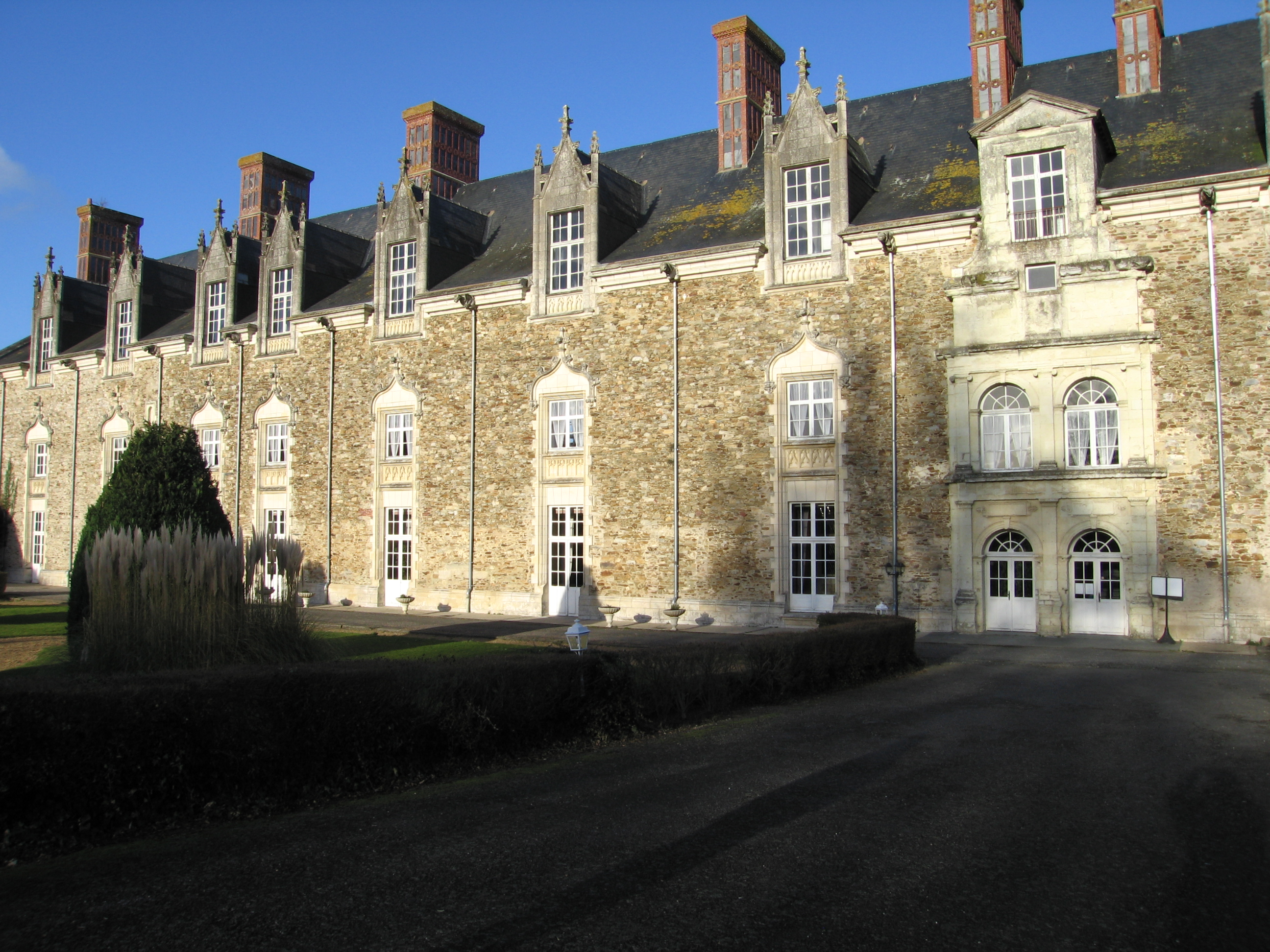 Aile Nord du Château de Blain, le Logis du Roy, remaniée au XIXe siècle.